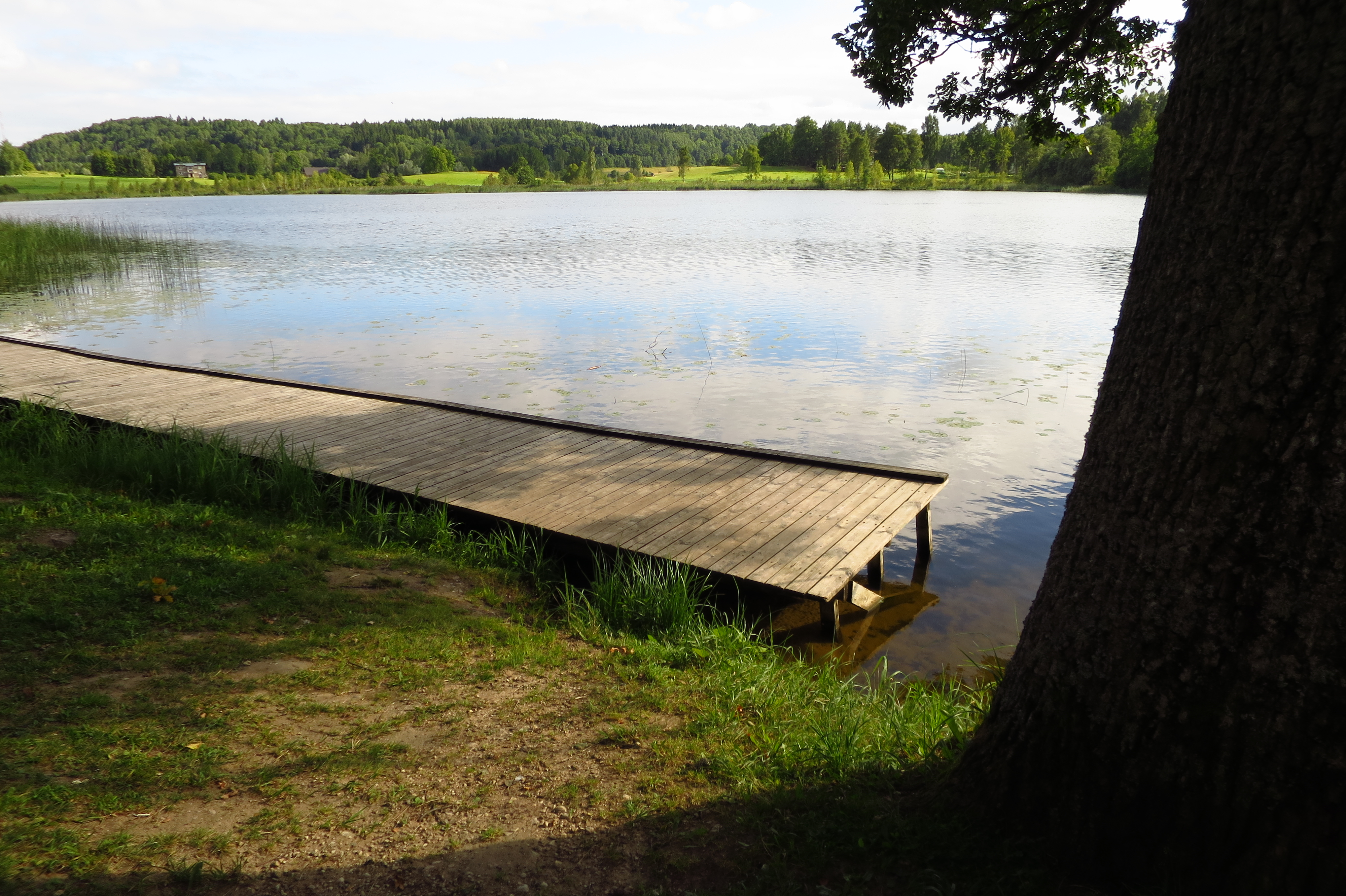 Pilkuse järv Otepää loodupargis